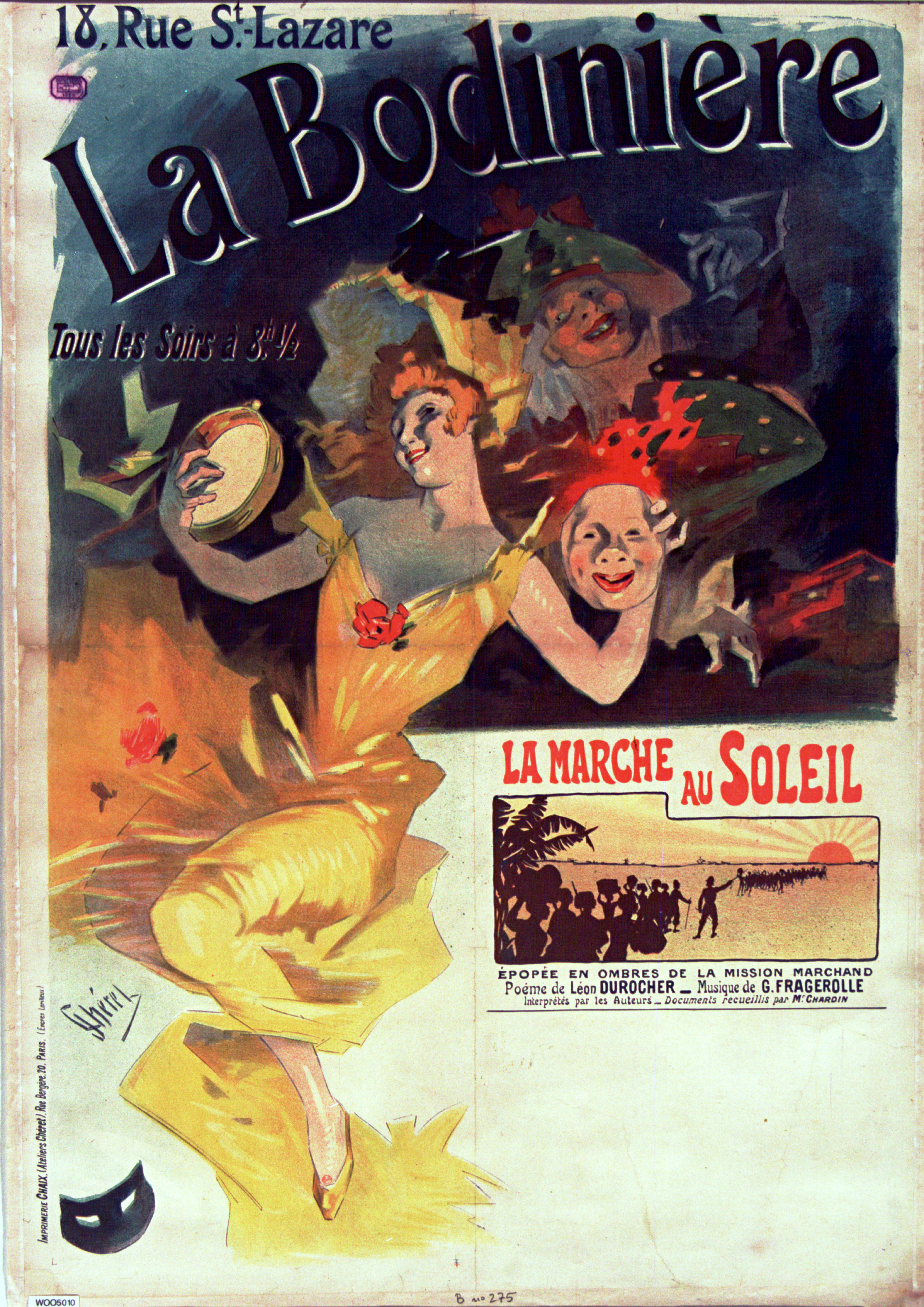 18 rue St Lazare. La Bodinière. La marche au Soleil, épopée en ombres de la mission Marchand. : affiche.